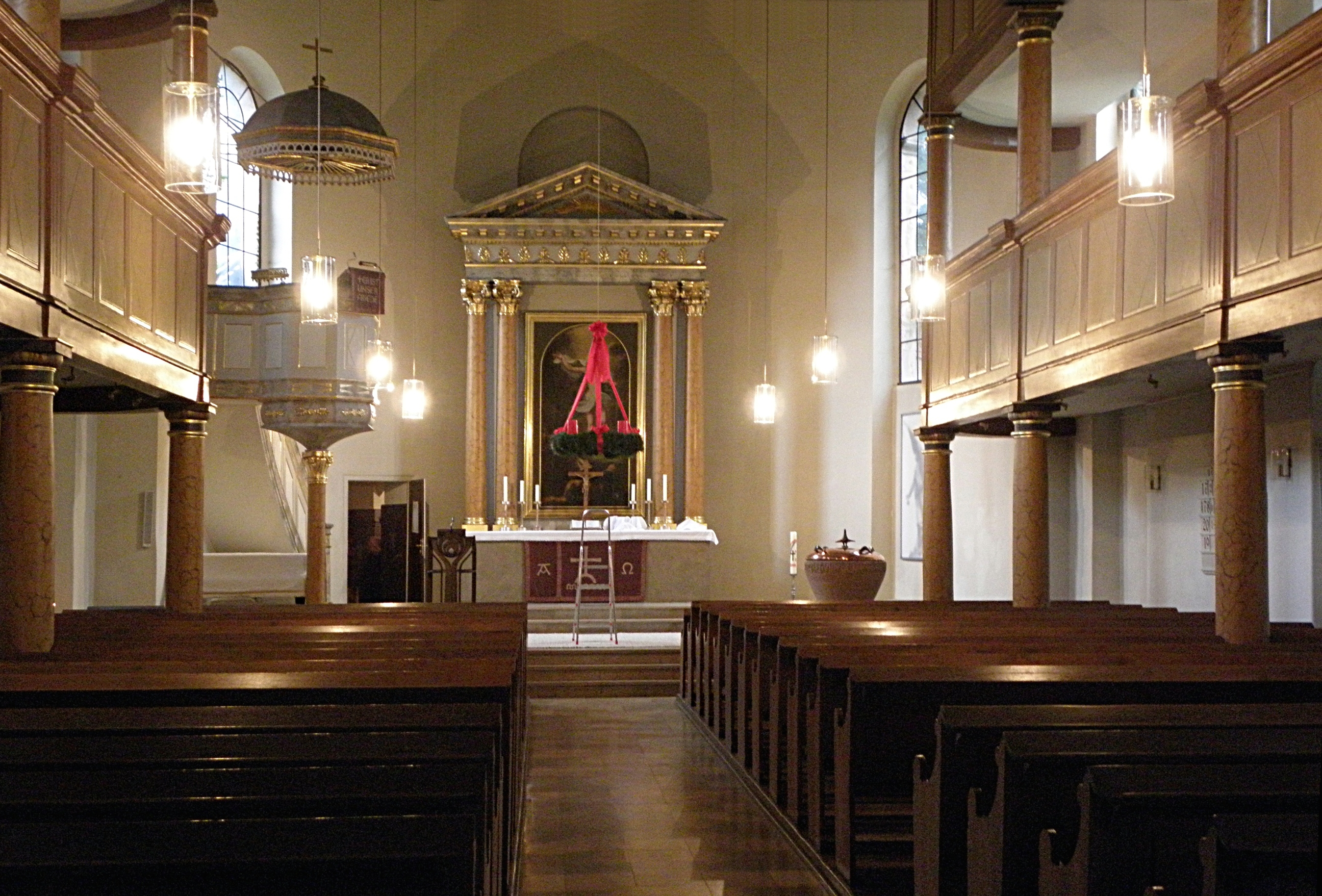 Fürth, Auferstehungskirche; Blick zur Apsis; Empore(n), Kanzel, Altar, Taufstein